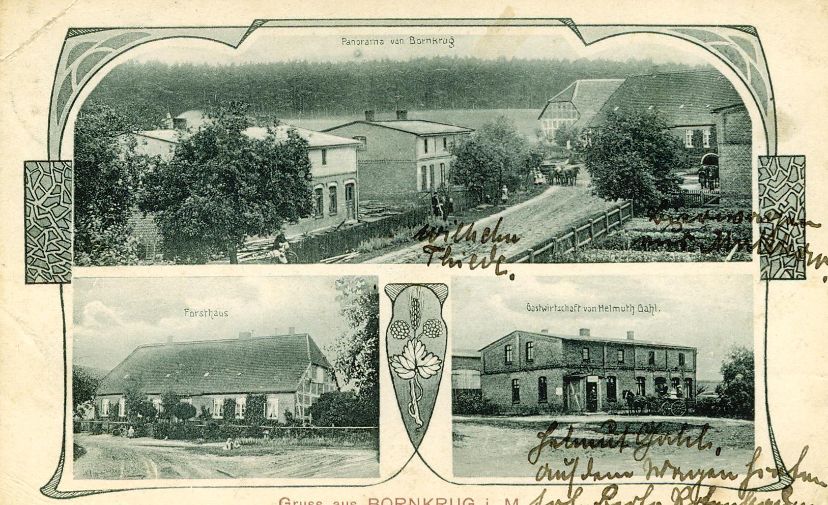 beschriebene Postkarte mit 3 Fotografien des Waldarbeiterdorfes Bornkrug bei Linstow in Mecklenburg